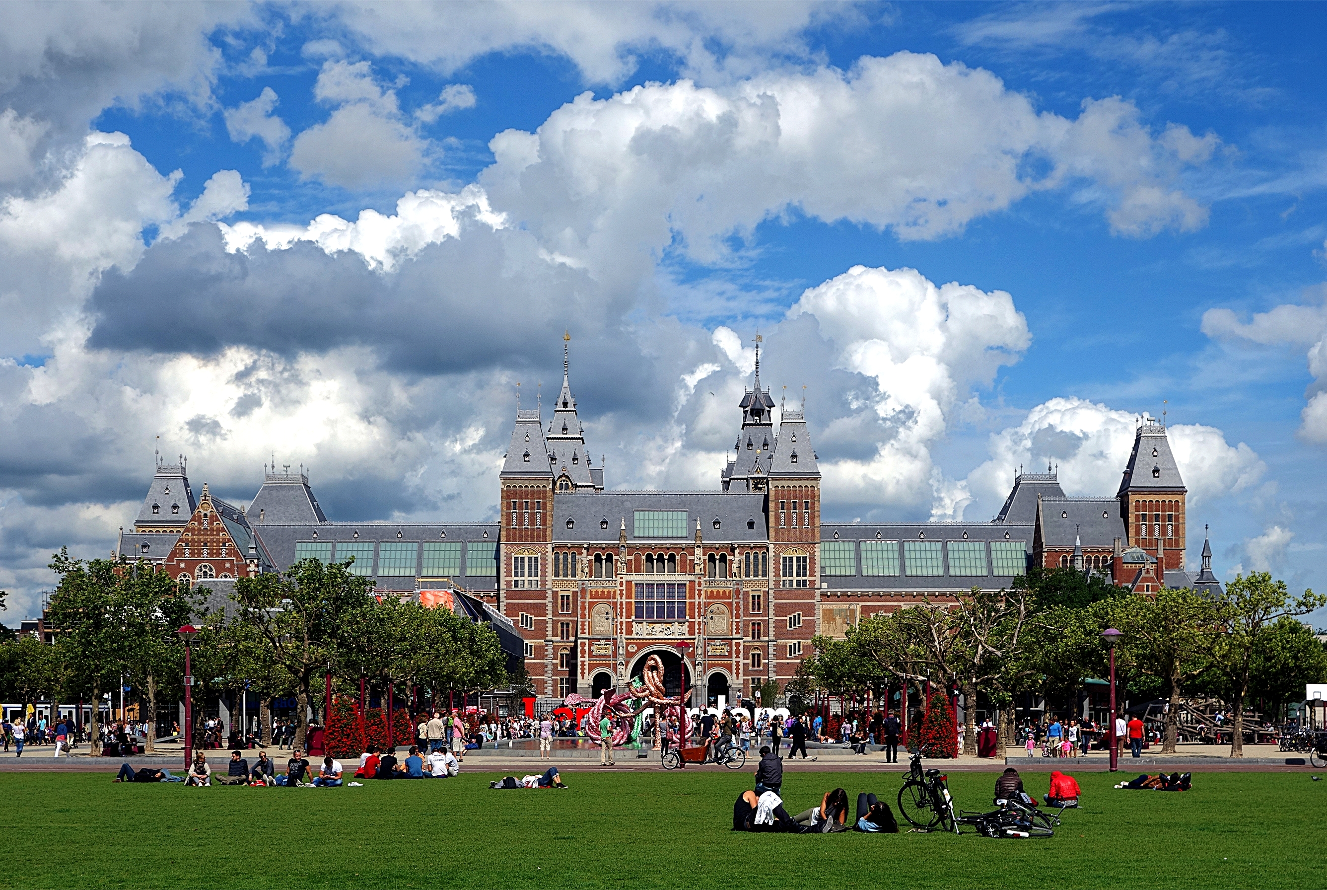 Le Rijksmuseum d'Amsterdam.